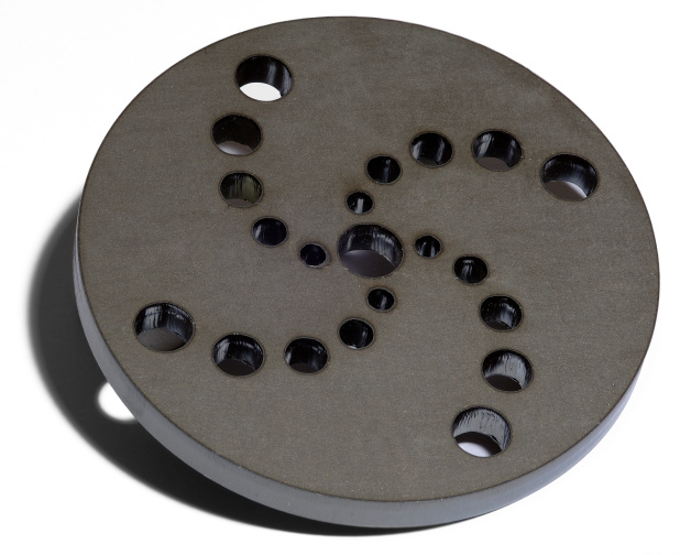 Bystronic Laserteil